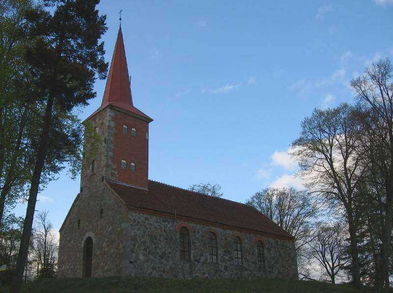 Dzięcielec - rzymskokatolicki kościół filialny p.w. św. Stanisława Biskupa i Męczennika, 1842-1845